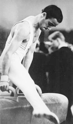 Gerhard Dietrich. DDR-Teilnehmer der XIX. Olympischen Sommerspiele vom 12. - 27.10.1968 in Mexiko-Stadt.